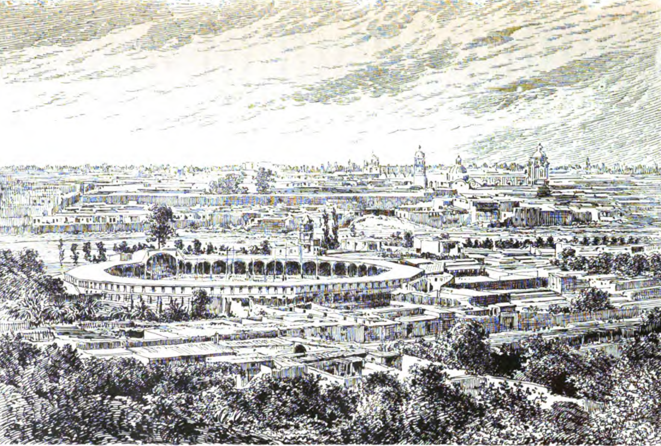 Vista de Lima hacia 1878